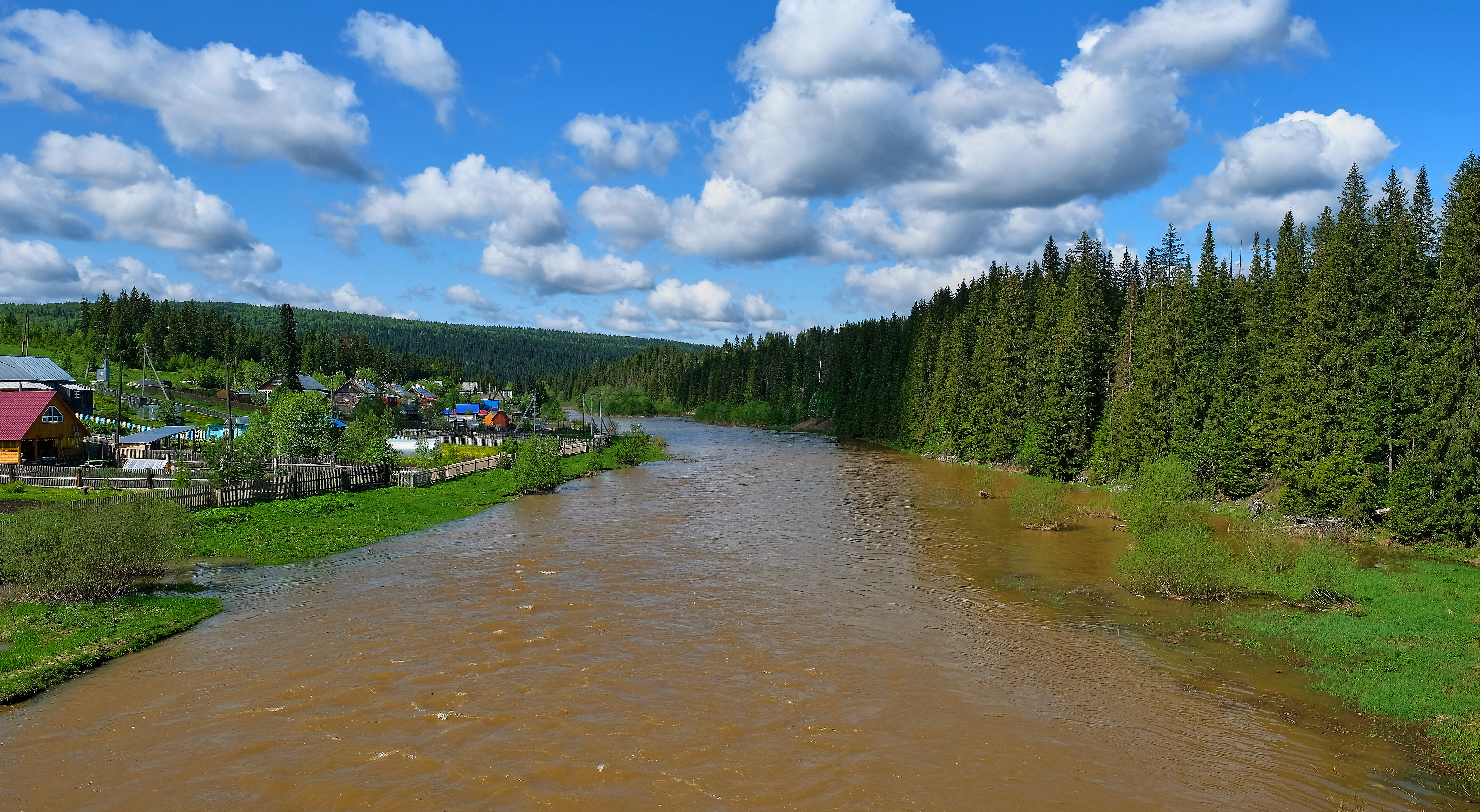 Вижай между Горнозаводском и Пашией около посёлка Вижайский Прииск